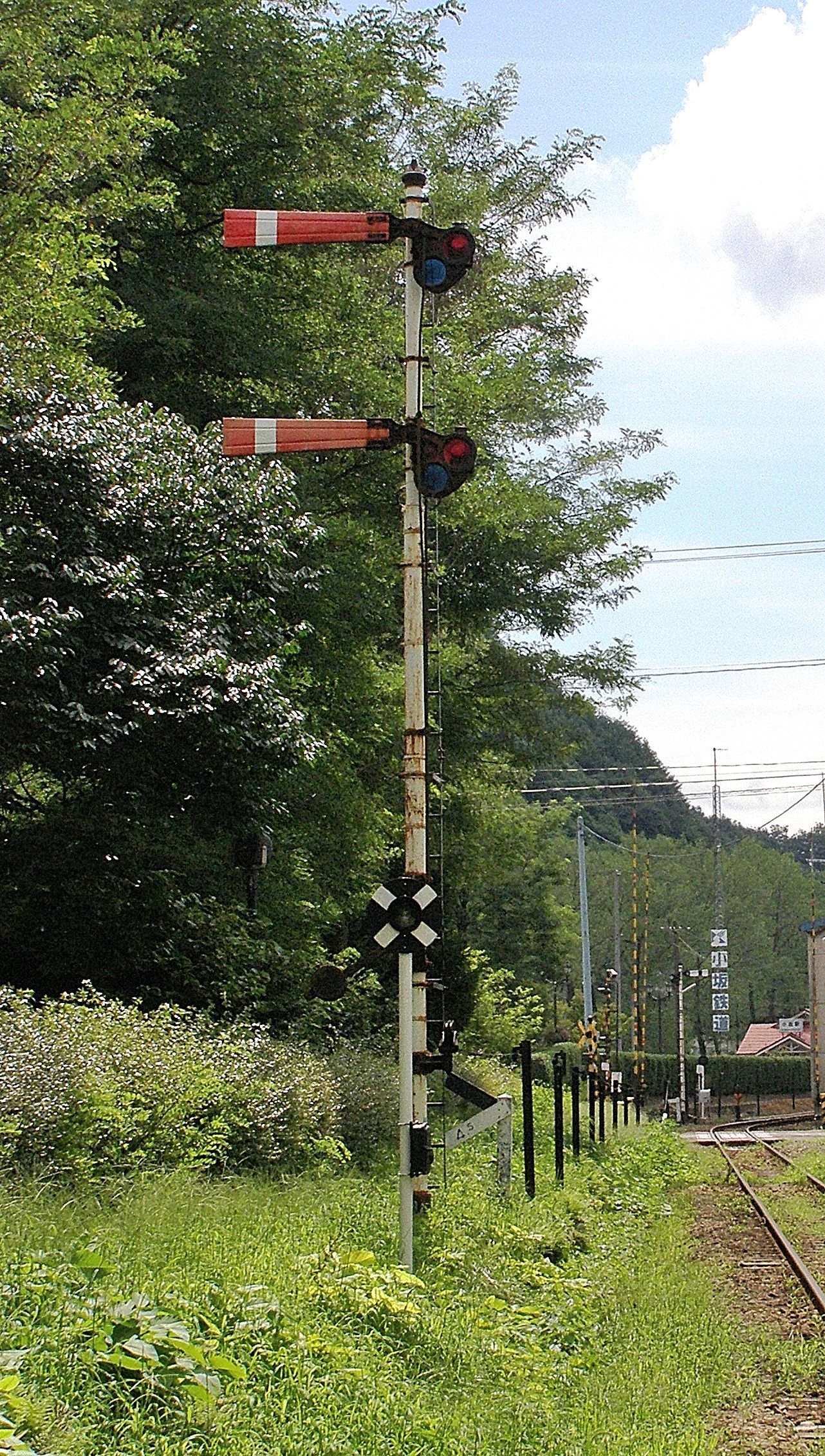 小坂鉄道小坂駅（廃止）で使用されていた腕木式信号機